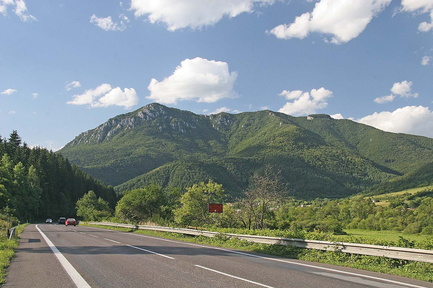 Šíp (1169 m) - pohled od obce Stankovany